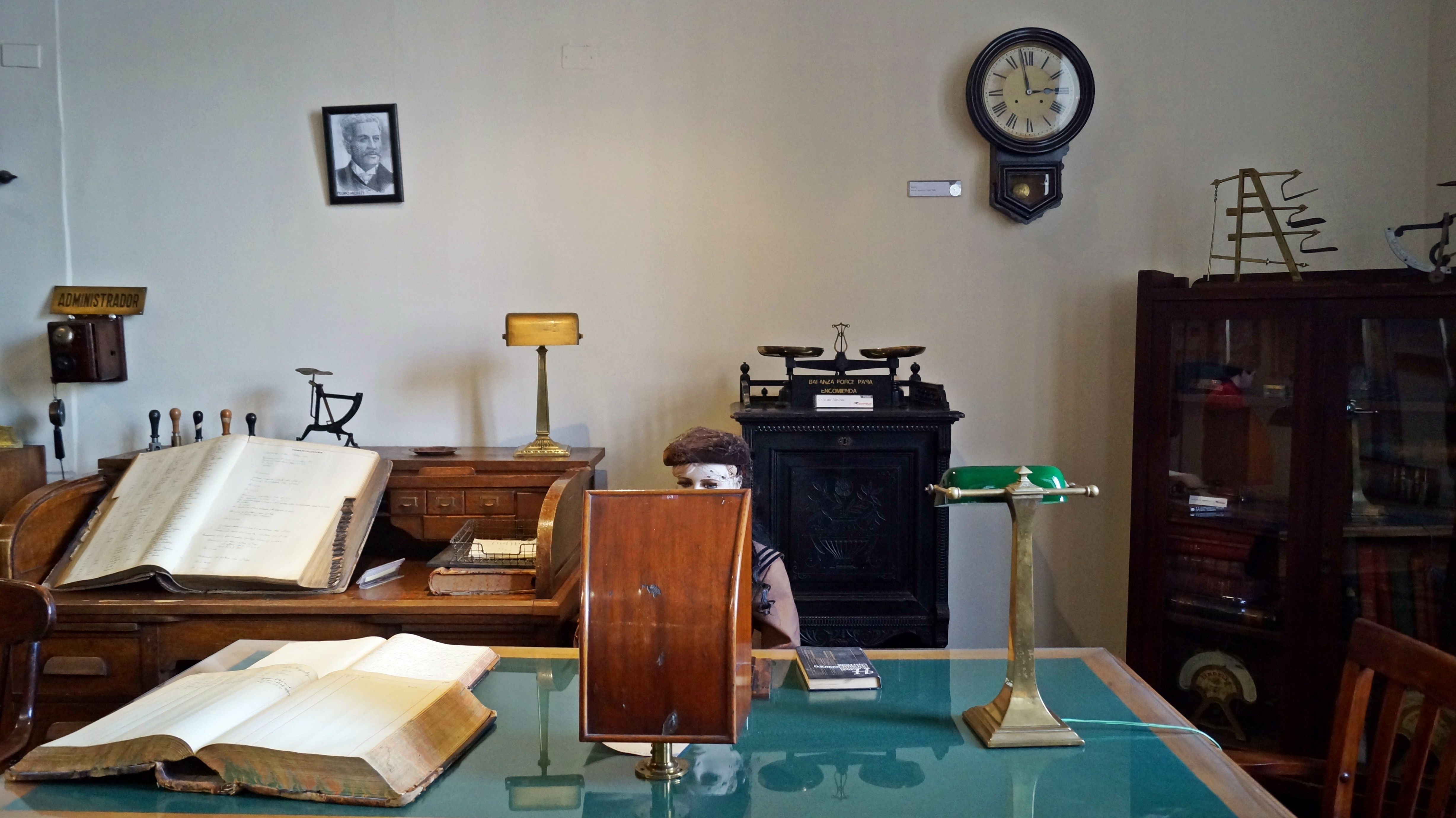 Representación del correo antiguo en Chile